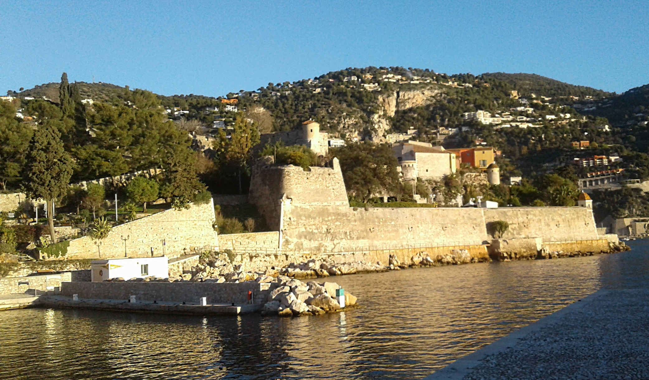 Citadelle de Villefranche-sur-Mer (Alpes-Maritimes, France) vue de la mer